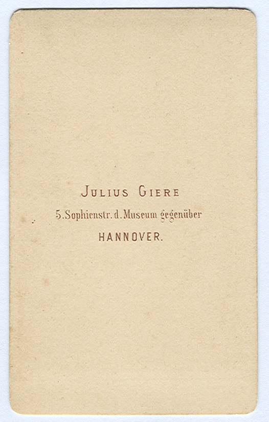 Rückseite einer Carte de visite (unbekannter Herr mit Backenbart) von Julius Giere